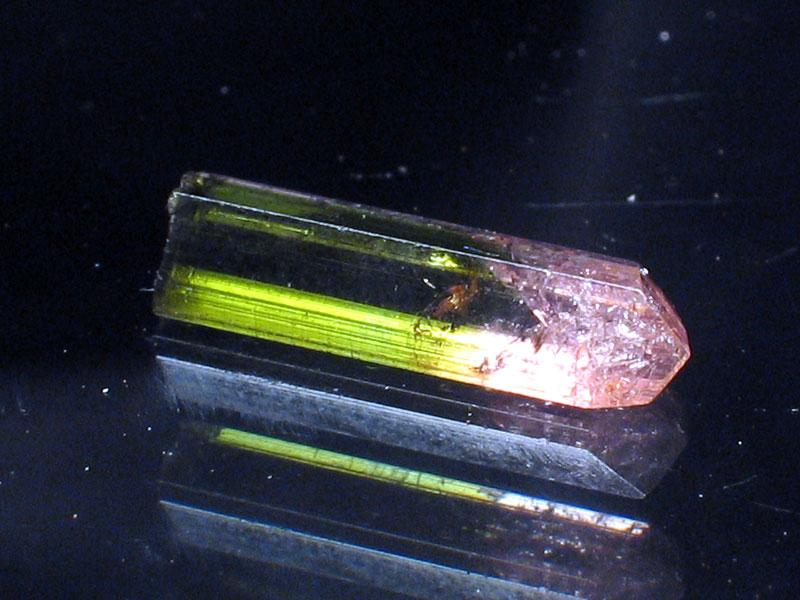 turmalin arbuzowy, pochodzenie Madagaskar, autor zdjęcia Stowarzyszenie Spirifer